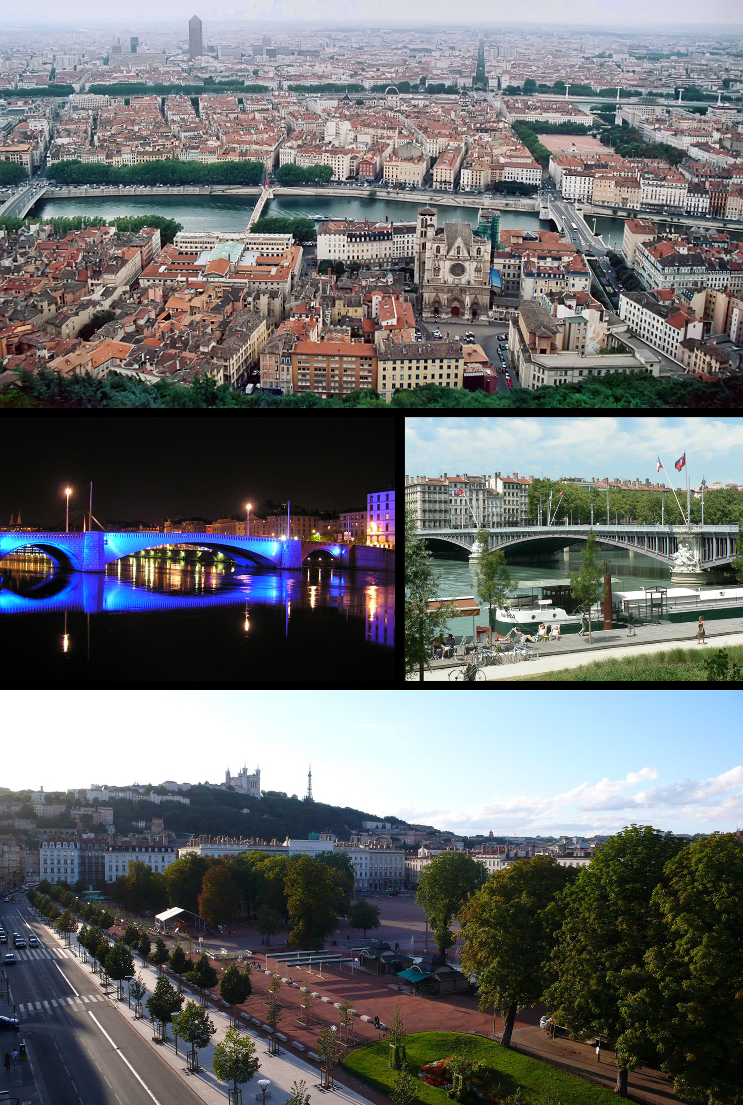 Vue sur Lyon depuis Fourvière, Saône, Rhône et Place Bellecour